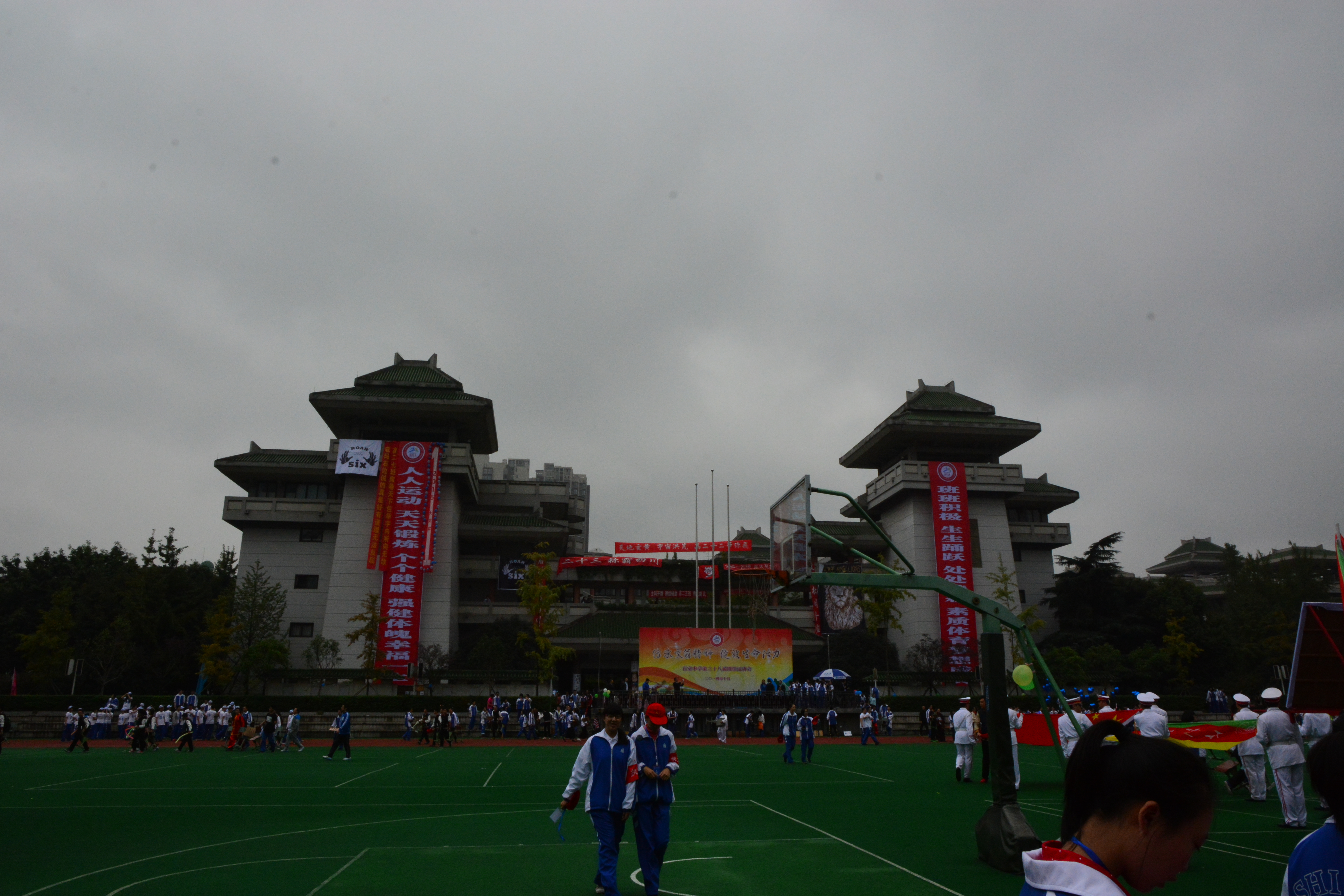 成都石室中学教学楼